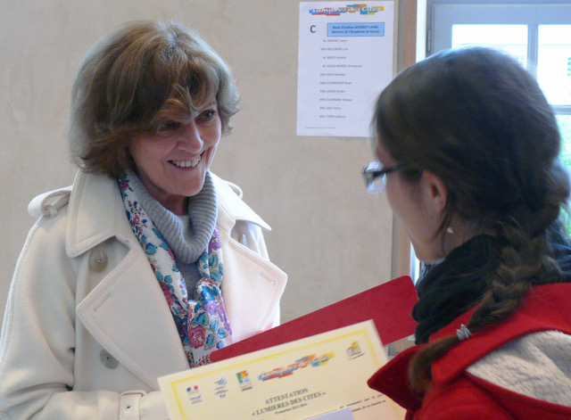 rencontre avec une étudiante